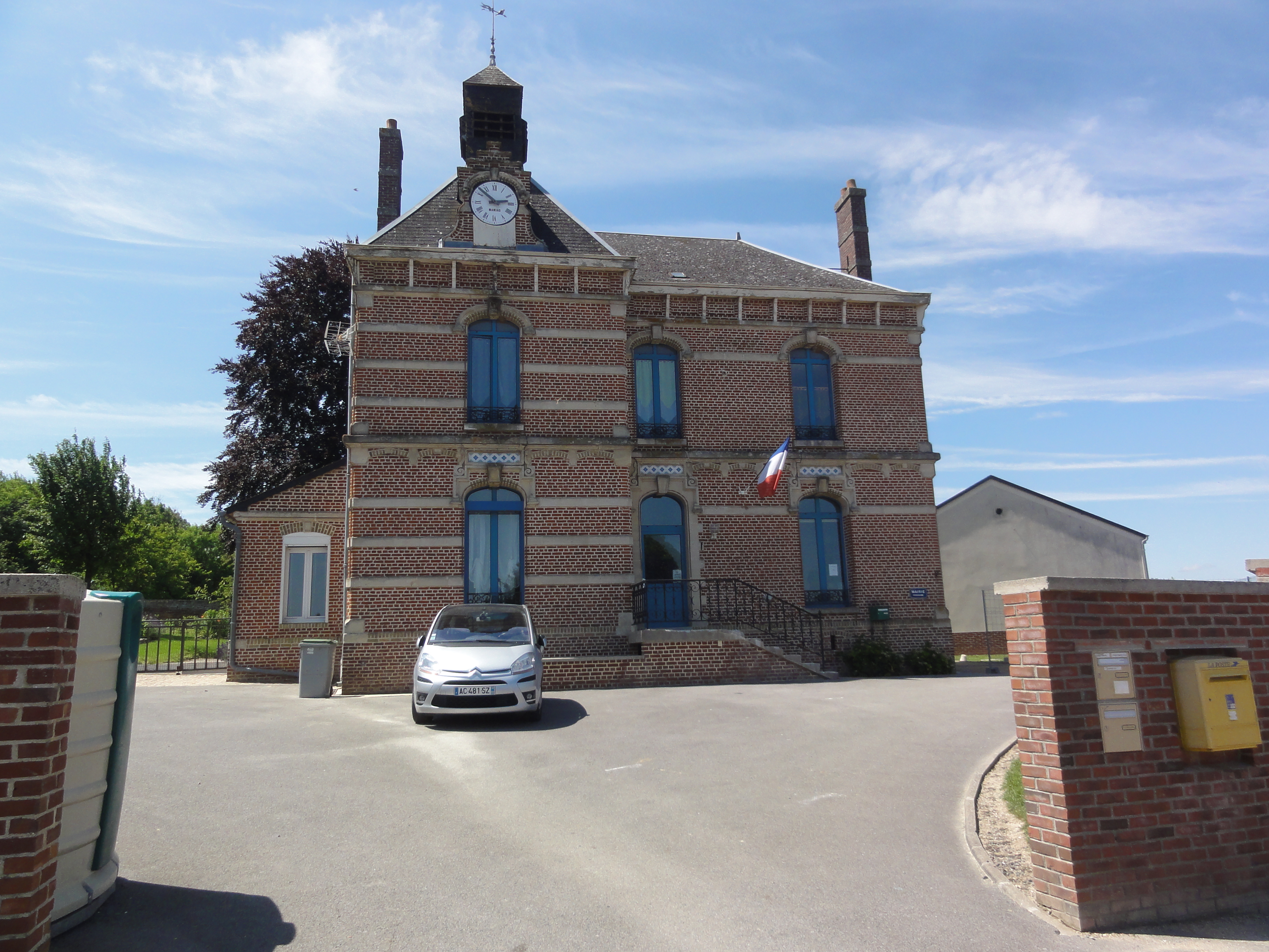 Sons-et-Ronchères (Aisne) mairie